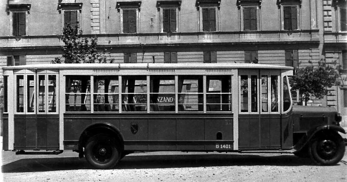 Autobus Lancia Omicron di Roma. Prototipo seconda fornitura.